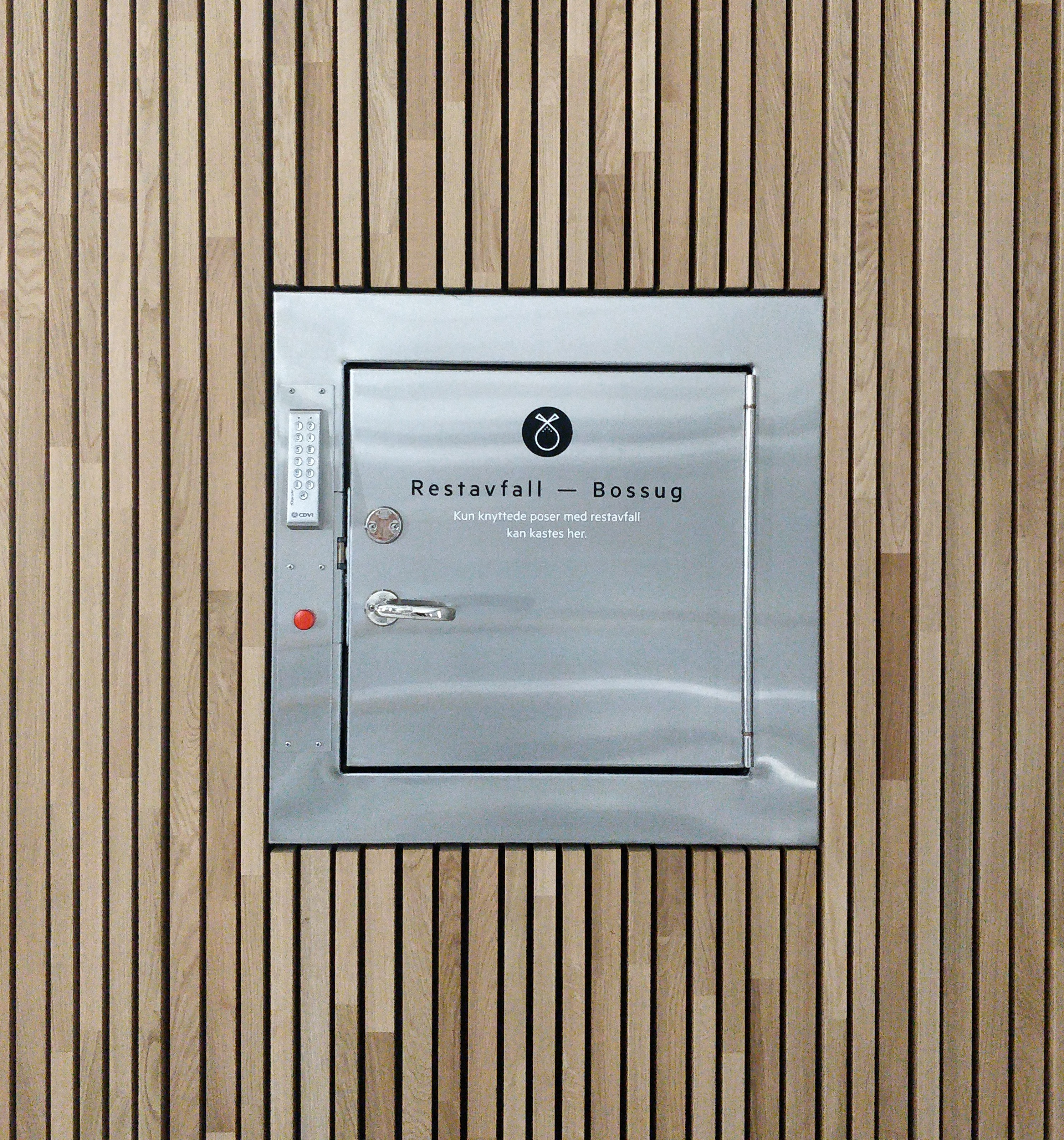 Innendørs bossug i Jonsvollskvartalet